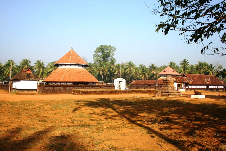 ഐരാണികുളം സിവക്ഷേത്രം